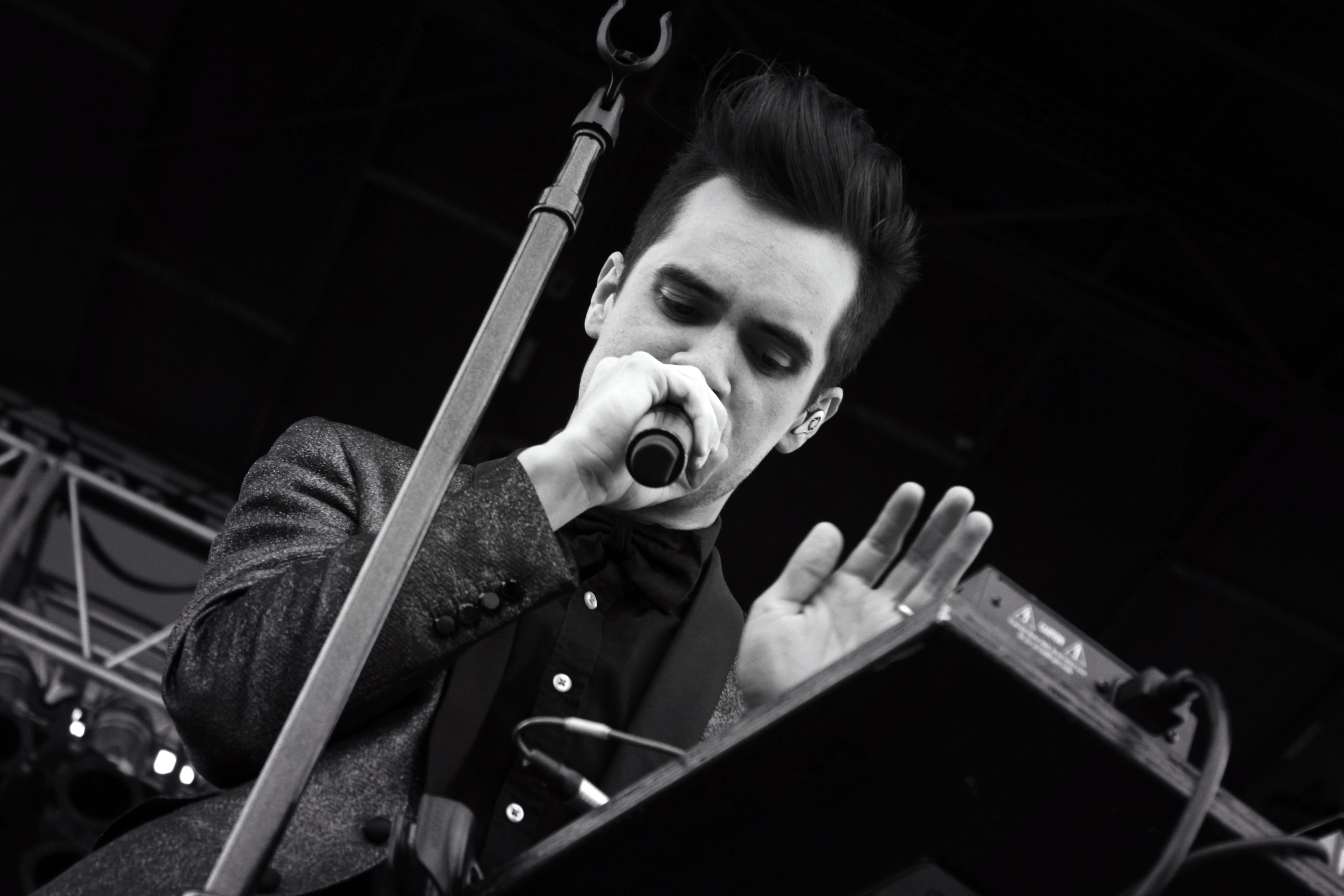 Brendon Urie en vivo en 2014